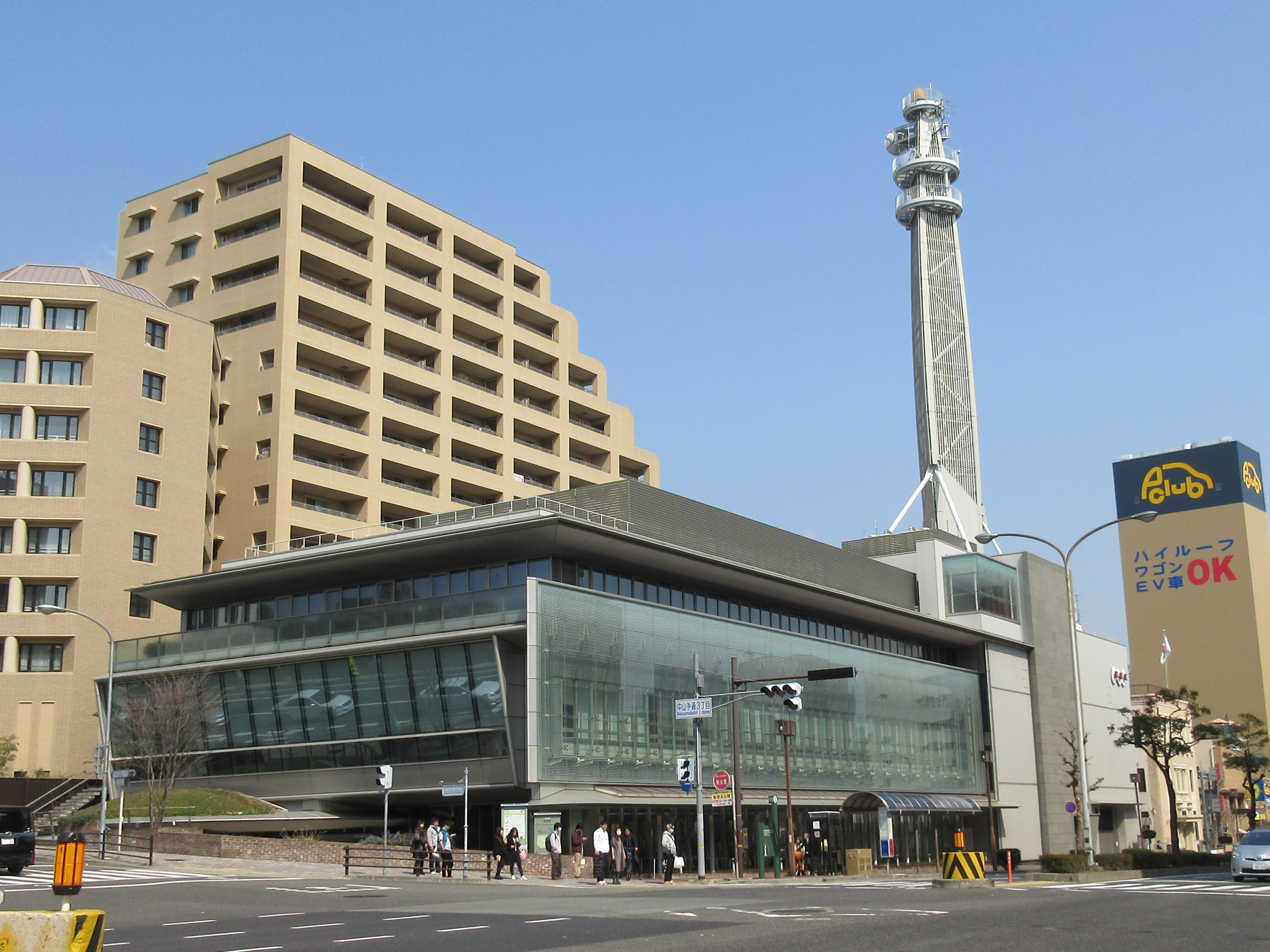 NHK神戸放送局 局舎